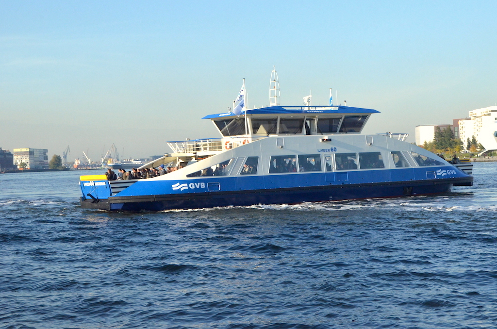 GVB IJveer 60 op het IJ. Foto: Erik Swierstra.